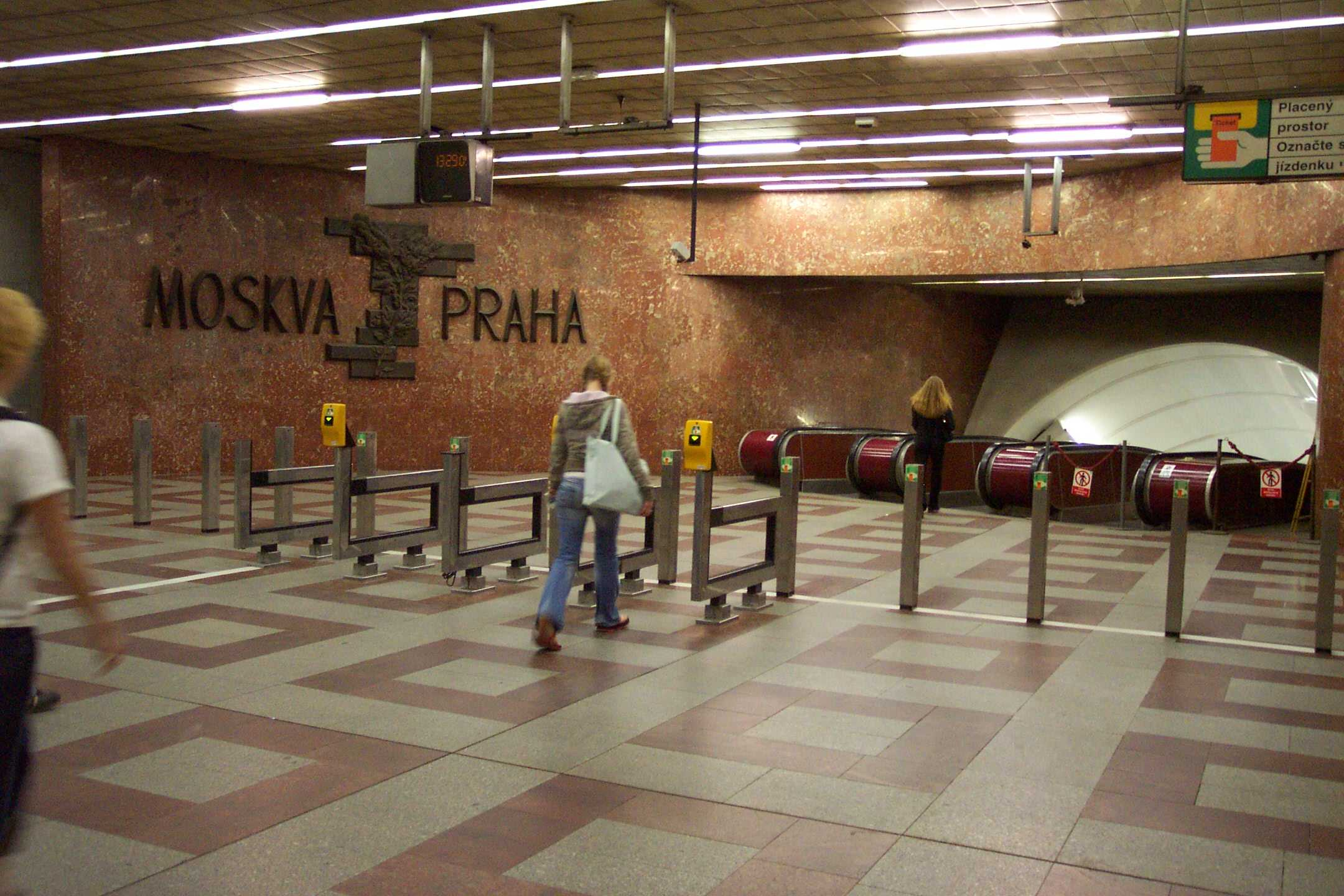 Vestible of Anděl metro station Na Knížecí - Vestibul stanice metra Na Knížecí